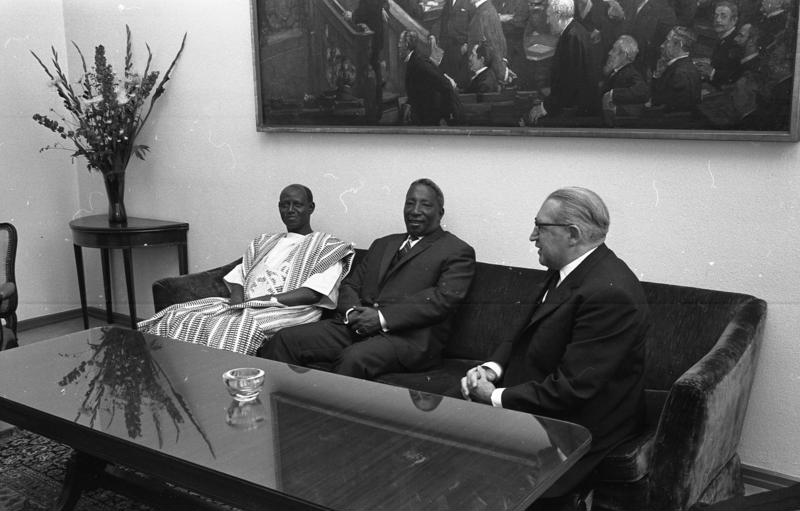 Bundestagsvizepräs. Dr. Dehler empf. den Präsidenten der Nationalversammlung von Mali, Alassane Haidara